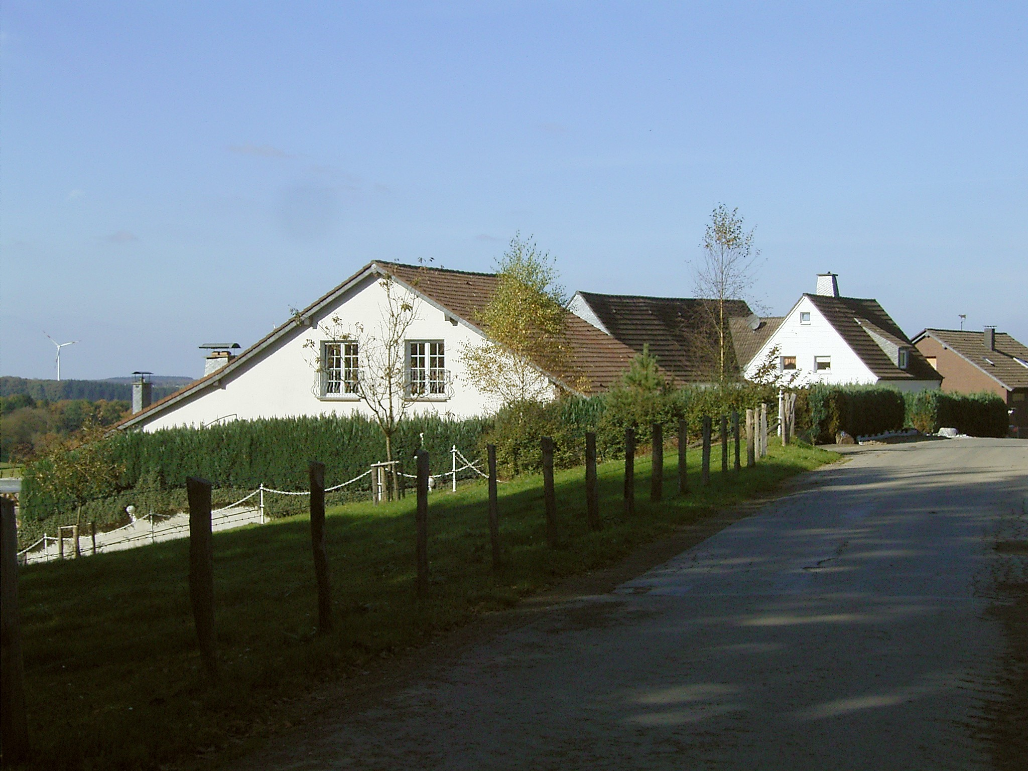 Radevormwald